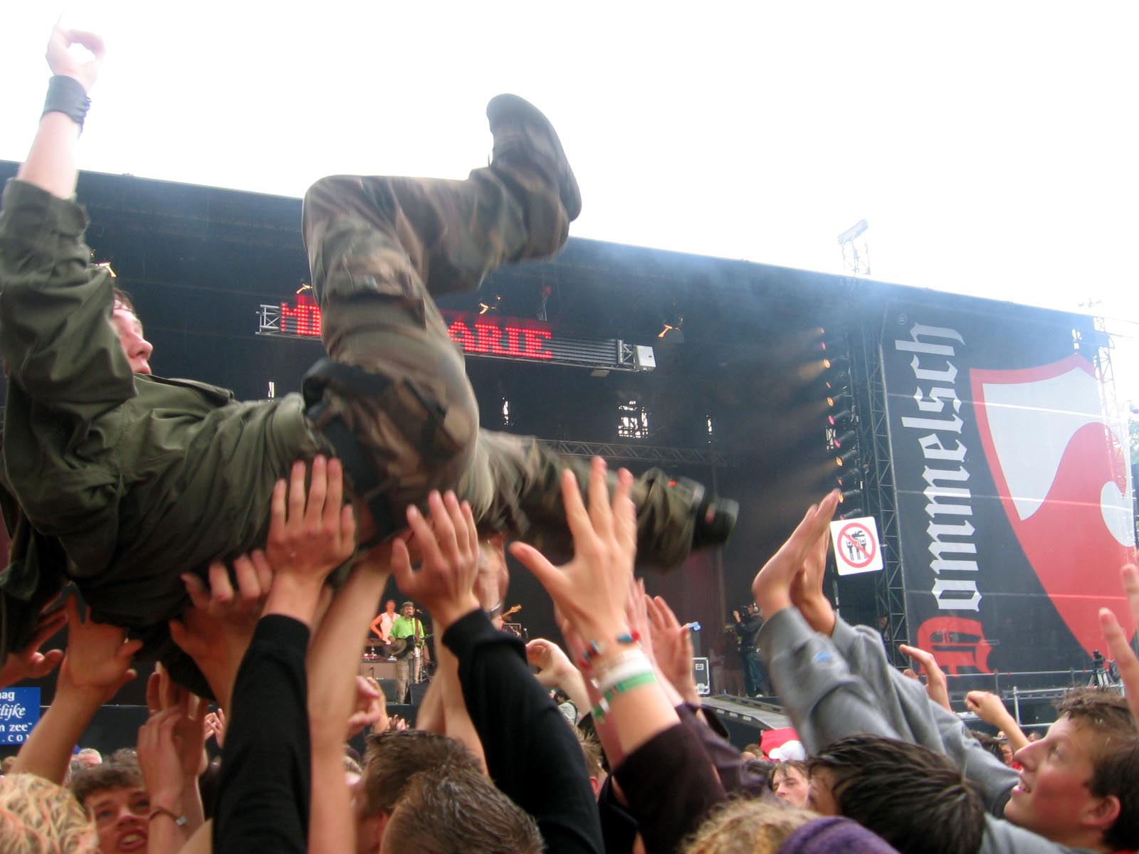 Crowd surfin bij Normaal, parkpop 2006